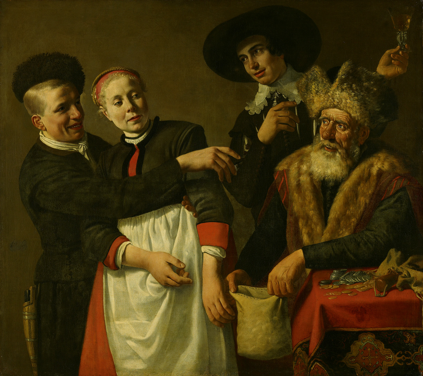 schilderij; Bredero, Gerbrand Adriaensz.; allegorie